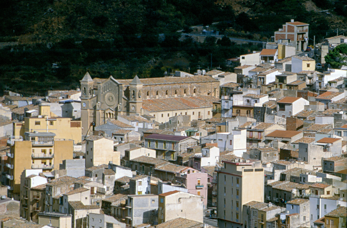 Collesano, province of Palermo, Sicily